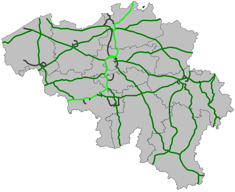 Traject Europese weg 19 door België